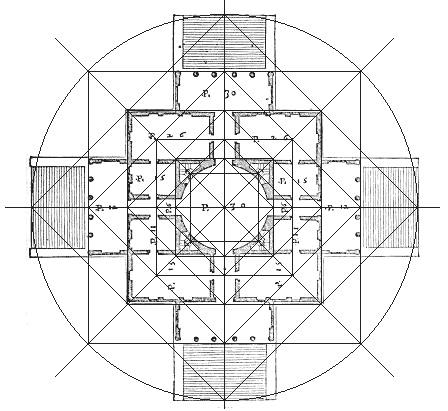 schema de croissance harmonique par racine carré de 2 du plan de la villa Rotonda par Palladio